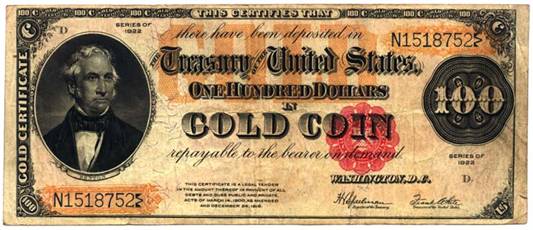 US gold certificate (1922)